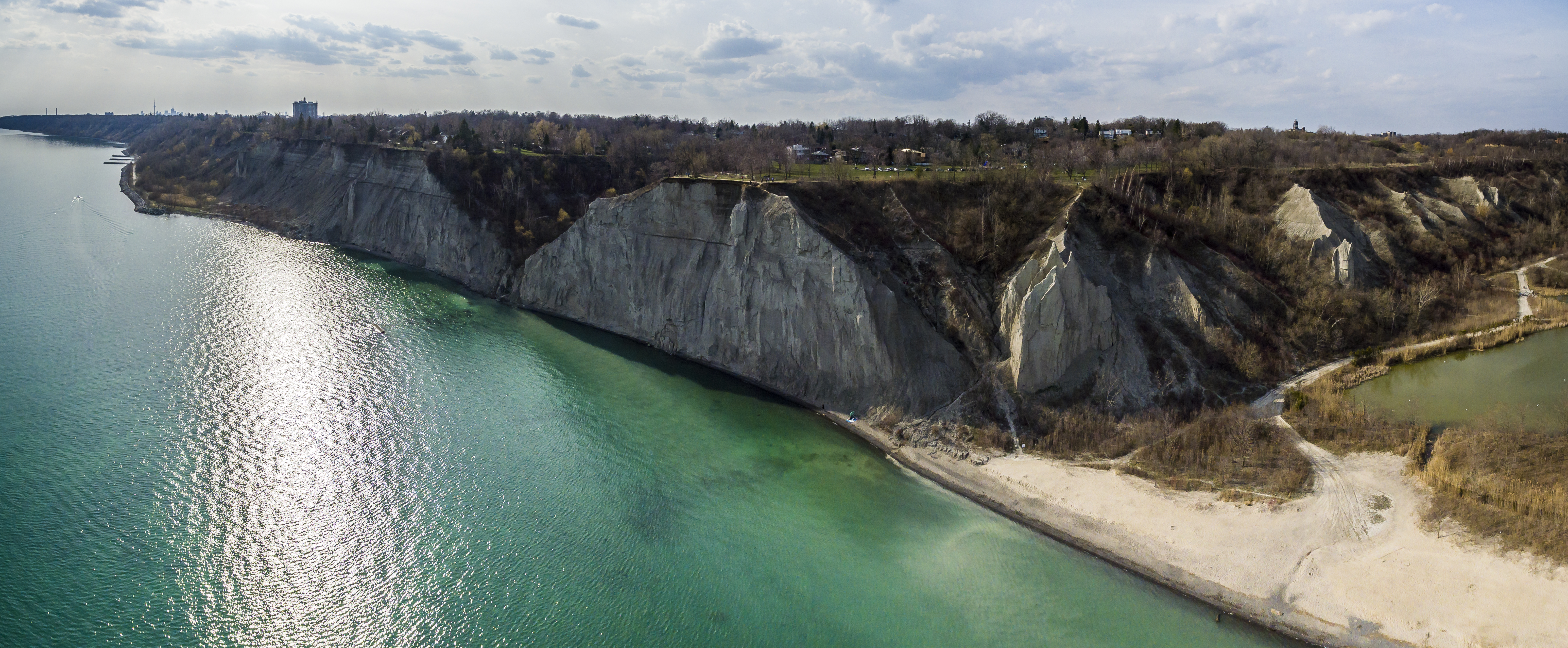 Bluffer's Park